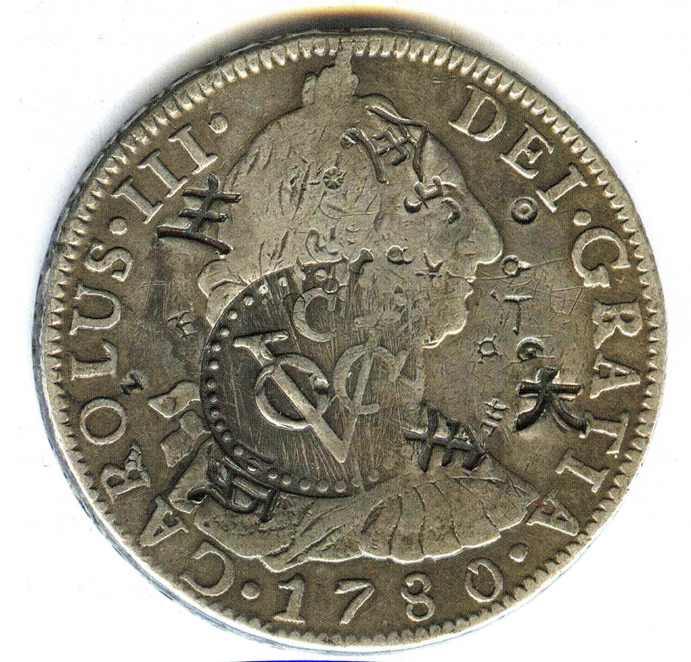 Moneda española con resello de la Compañía Holandesa de las Indias Orientales que circuló en Java.